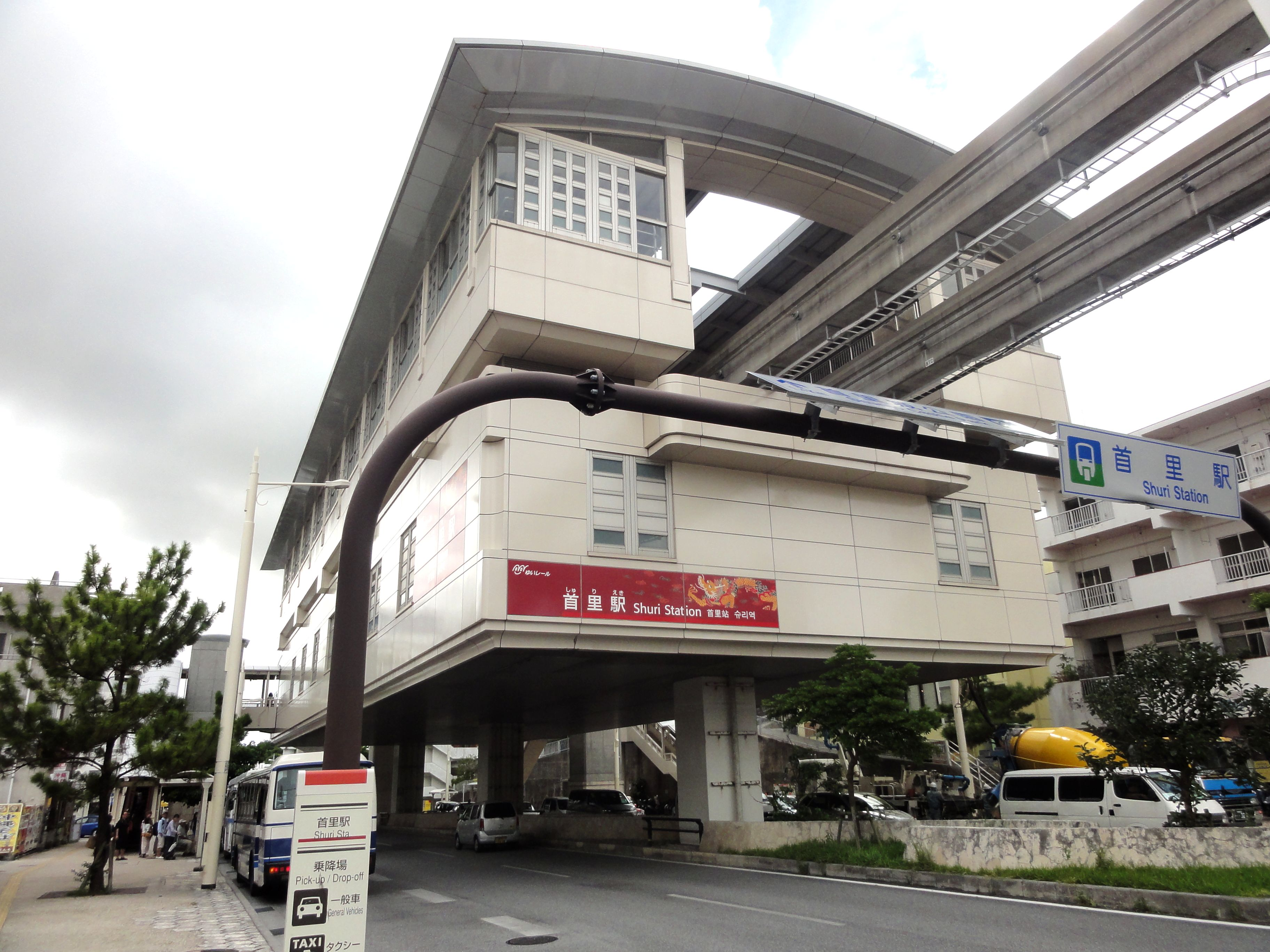 沖縄都市モノレール首里駅